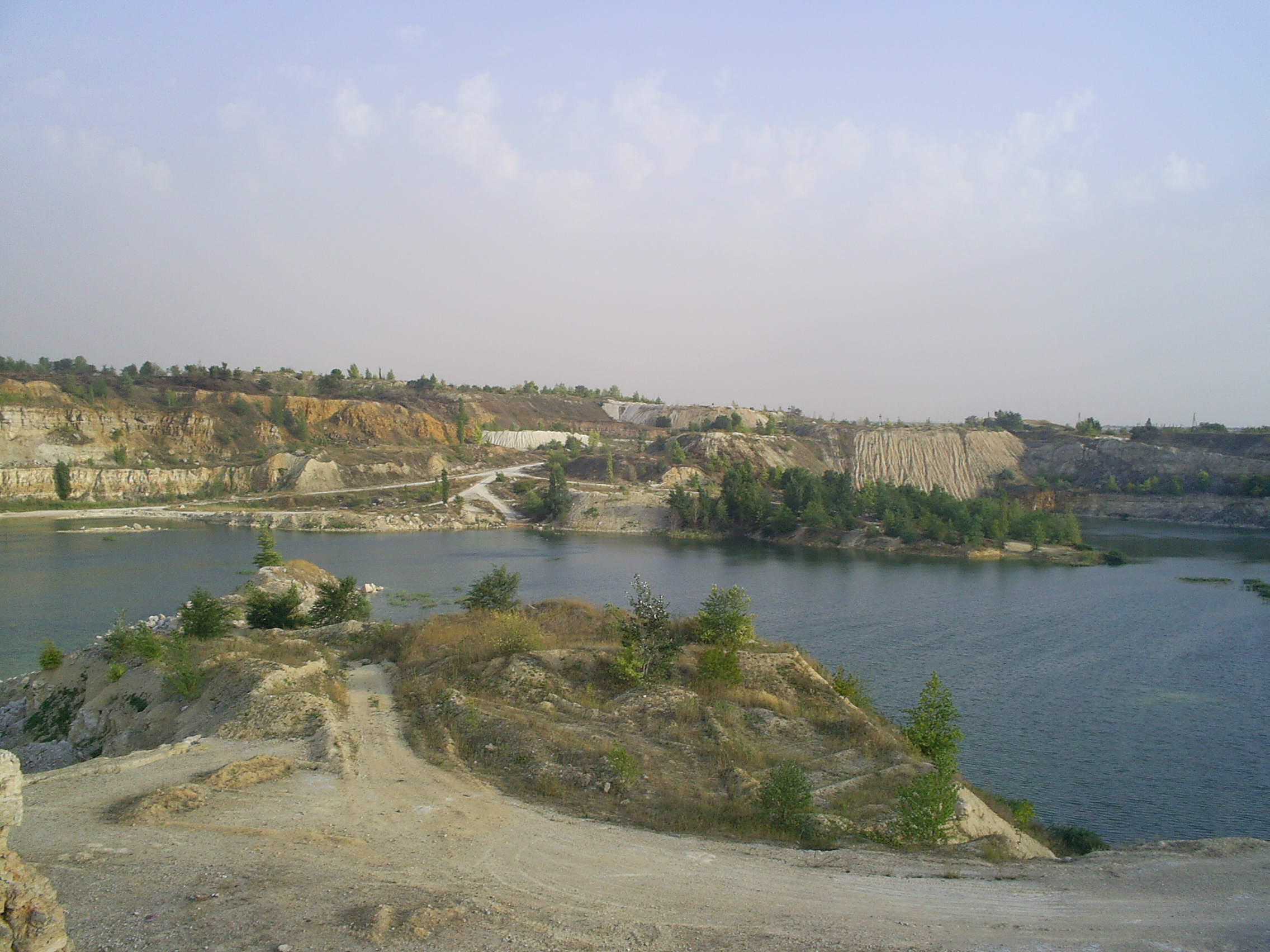 Заброшенный и затопленный карьер неподалёку от города Фролово